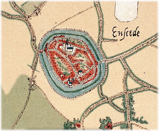 Plattegrond Enschede, 1570